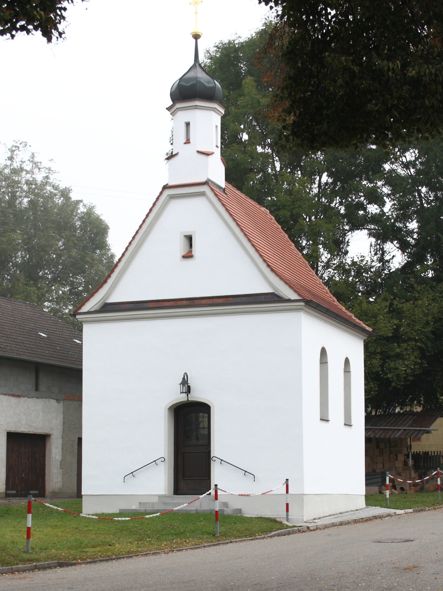 Kapelle Sankt Wendelin in Waltenberg, Gemeinde Ebershausen; Ansicht von Südwesten